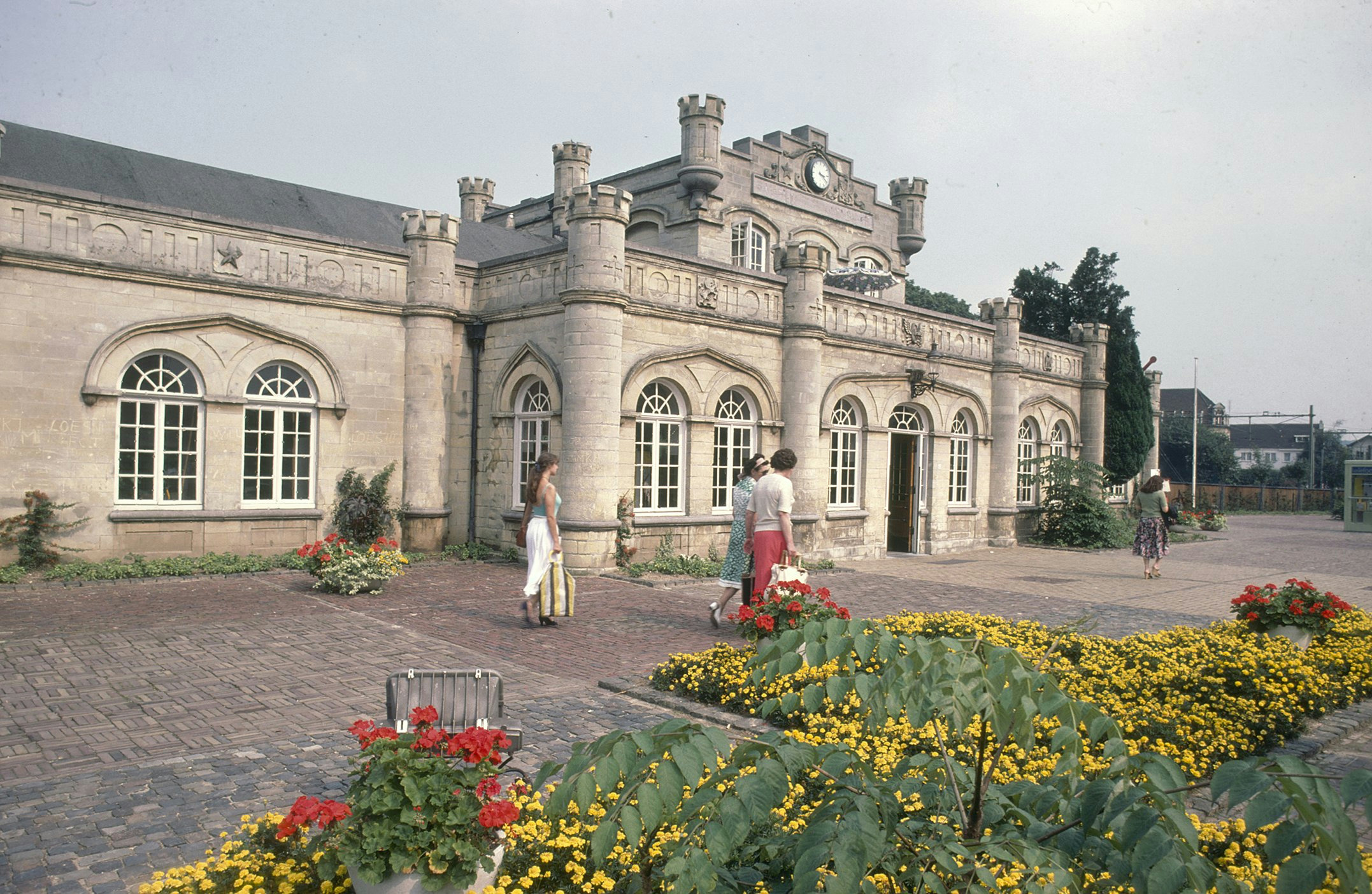 Station: Exterieur VOORGEVEL